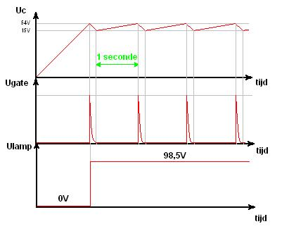 Zelf gemaakt